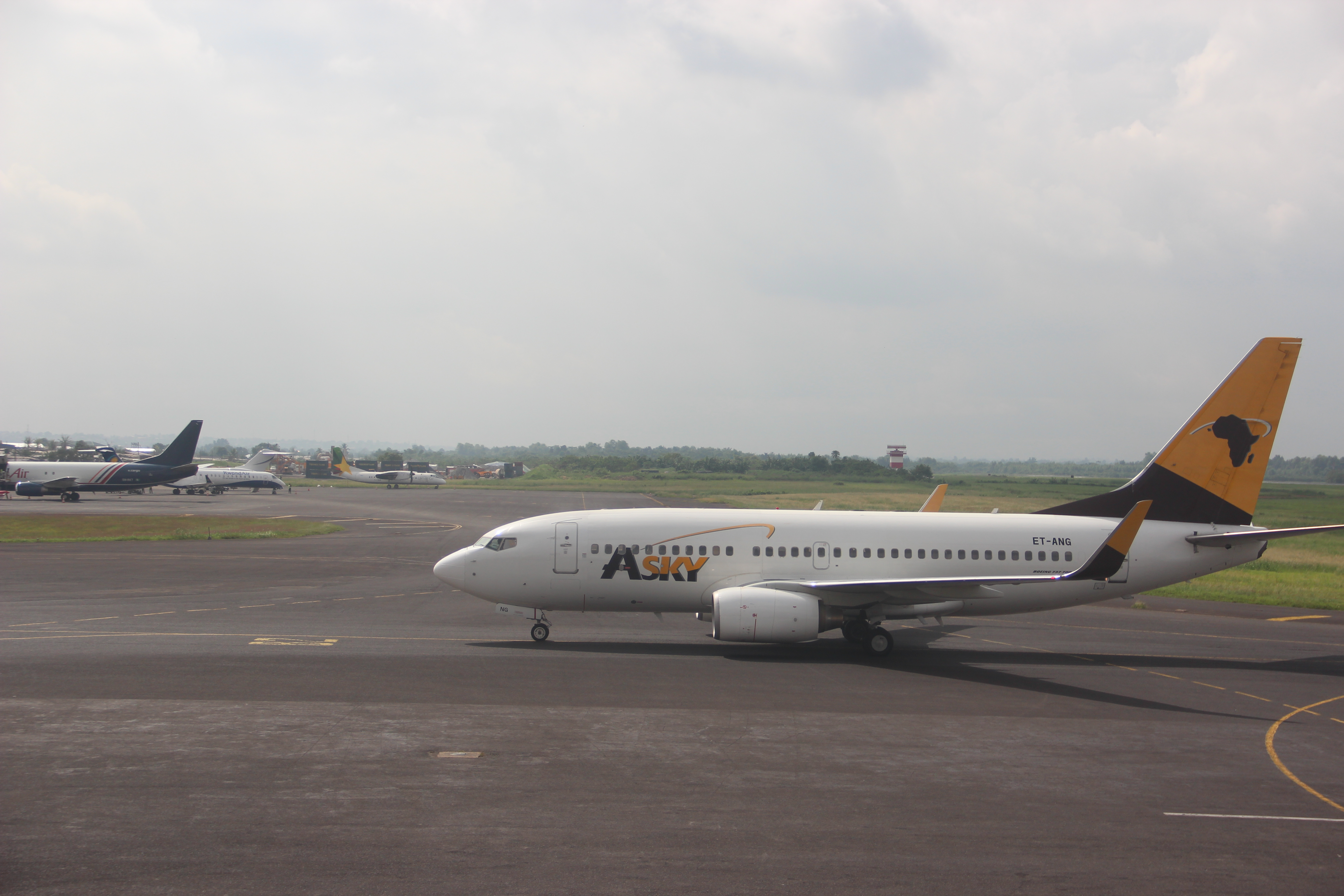 Boeing 737 de la compagnie togolaise Asky à l'aéroport de Douala. This is an image with the theme "Africa on the Move or Transport" from: Cameroon